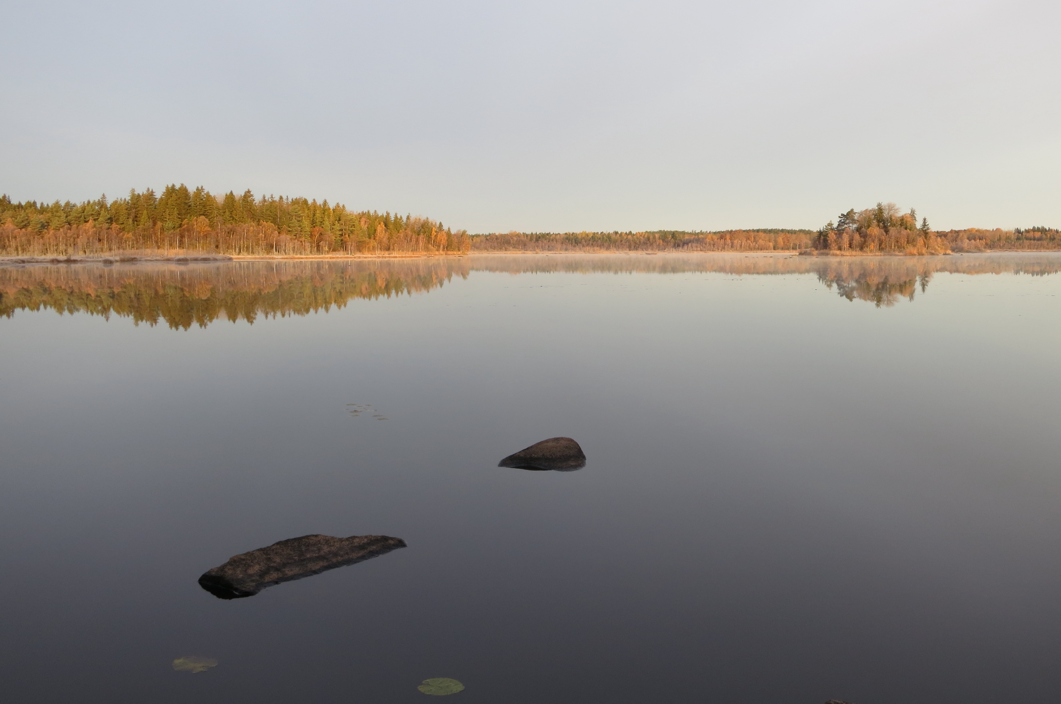 Ljudersjön i soluppgång